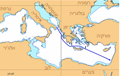 אוניית המעפילים לניצחון - מסלול